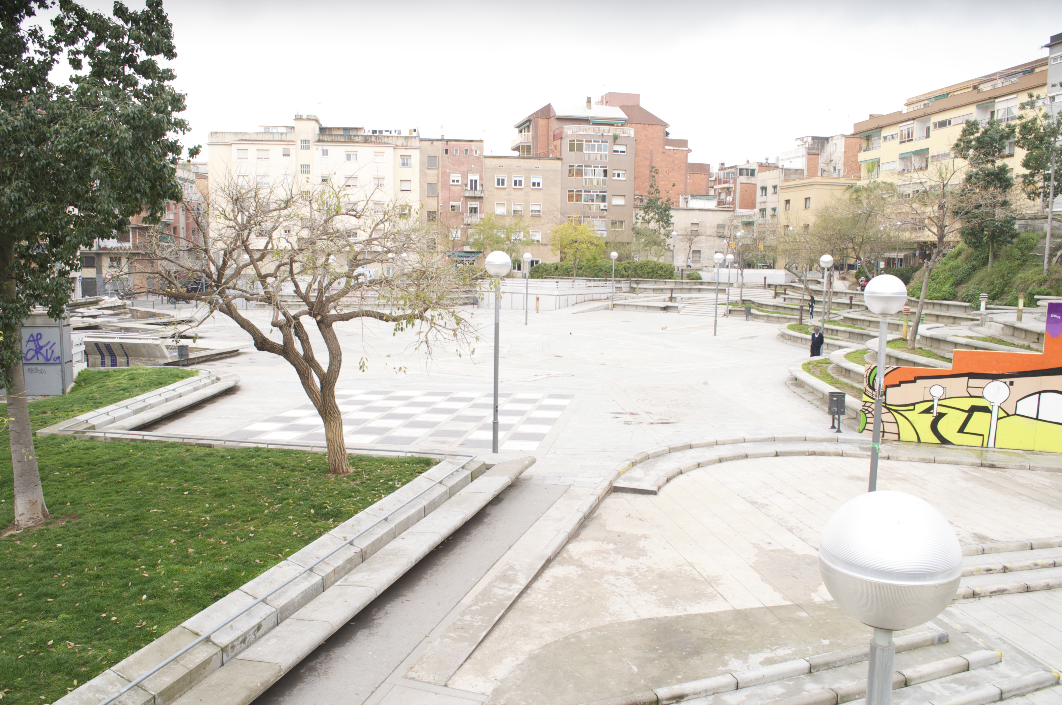 Una imatge de la Plaça Àngel Pestanya